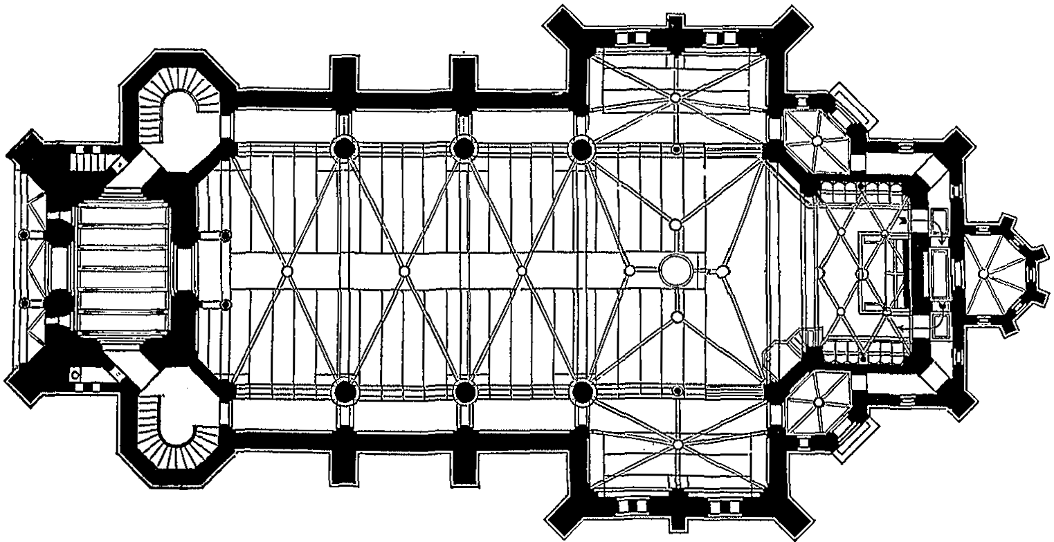 Christuskirche in Hamburg-Eimsbüttel), Neubau 1882-1884, Grundriss der Kirche